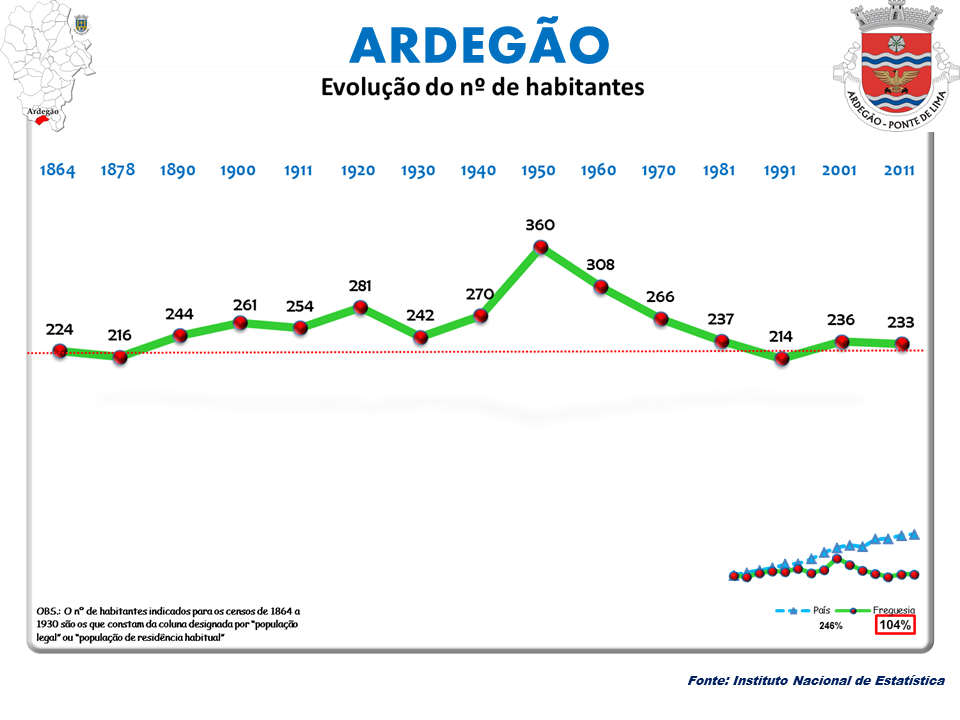 Censos 1864/2011